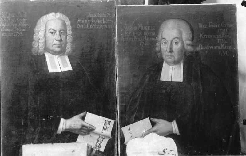 Porträtt av C. Aulin samt Sven Munthe. Kategori: (09) PorträttPorträtt av C. Aulin samt Sven Munthe.